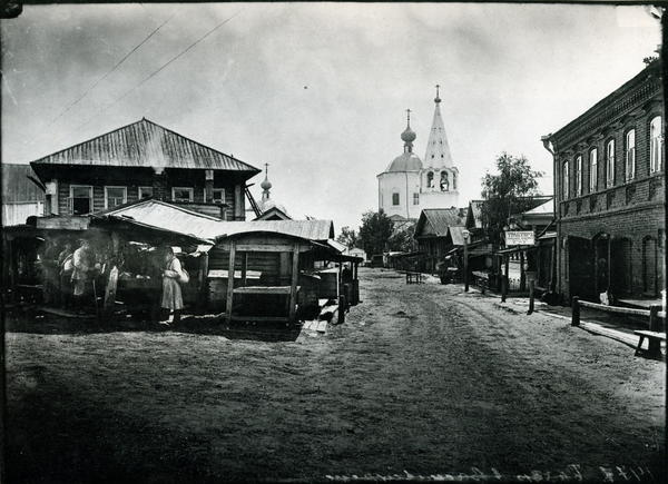 Базар в селе Васильева Слобода